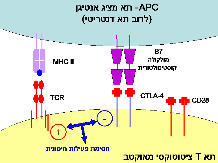 הפסקת פעילותו של תא T ציטוטוקסי מטווחת על ידי סיגנל שלילי ממולקולת CTLA-4 שבאה במגע עם מולקולה קוסטימולטורית. צייר: --Itayba 17:43, 1 יולי 2006 (IDT)